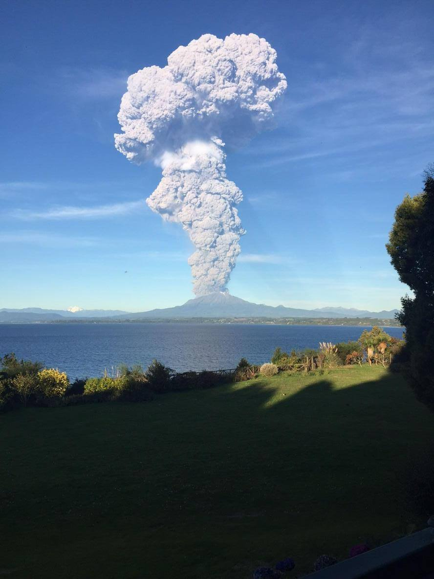 Vista del primer pulso eruptivo del Volcán Calbuco, producido a las 18:11 (UTC-3) del día miércoles 22 de Abril de 2015